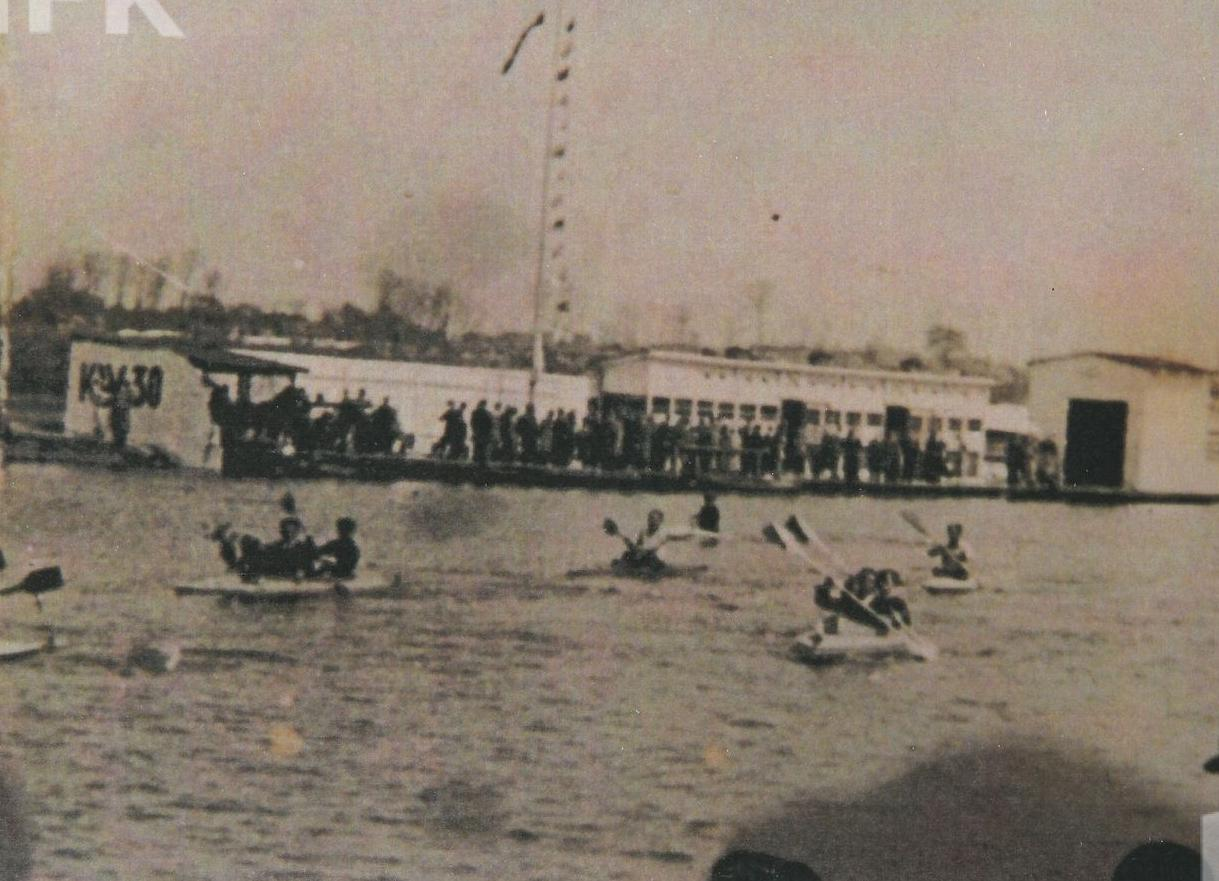 Przystań żydowskiego Klubu Wioślarskiego z roku 1930 w Kaliszu